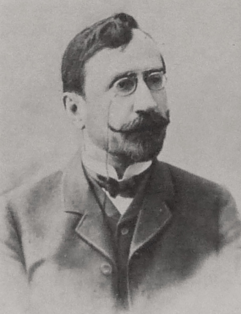 გრიგოლ ვოლსკი (დ. 24 იანვარი, 1860, ქუთაისი, — გ. 5 ოქტომბერი, 1909, თბილისი; დაკრძალულია ბათუმში), ქართველი პუბლიცისტი, პოეტი, ექიმი, საზოგადო მოღვაწე; წარმოშობით პოლონელი.